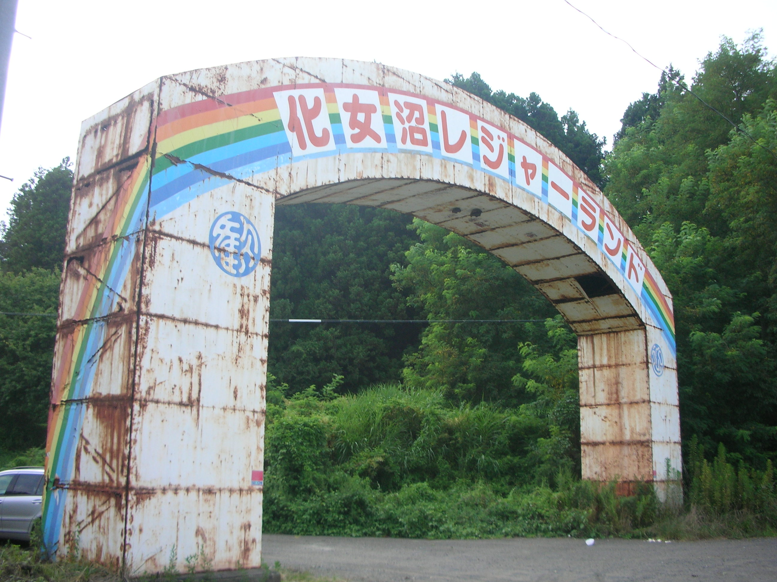 化女沼レジャーランド入口